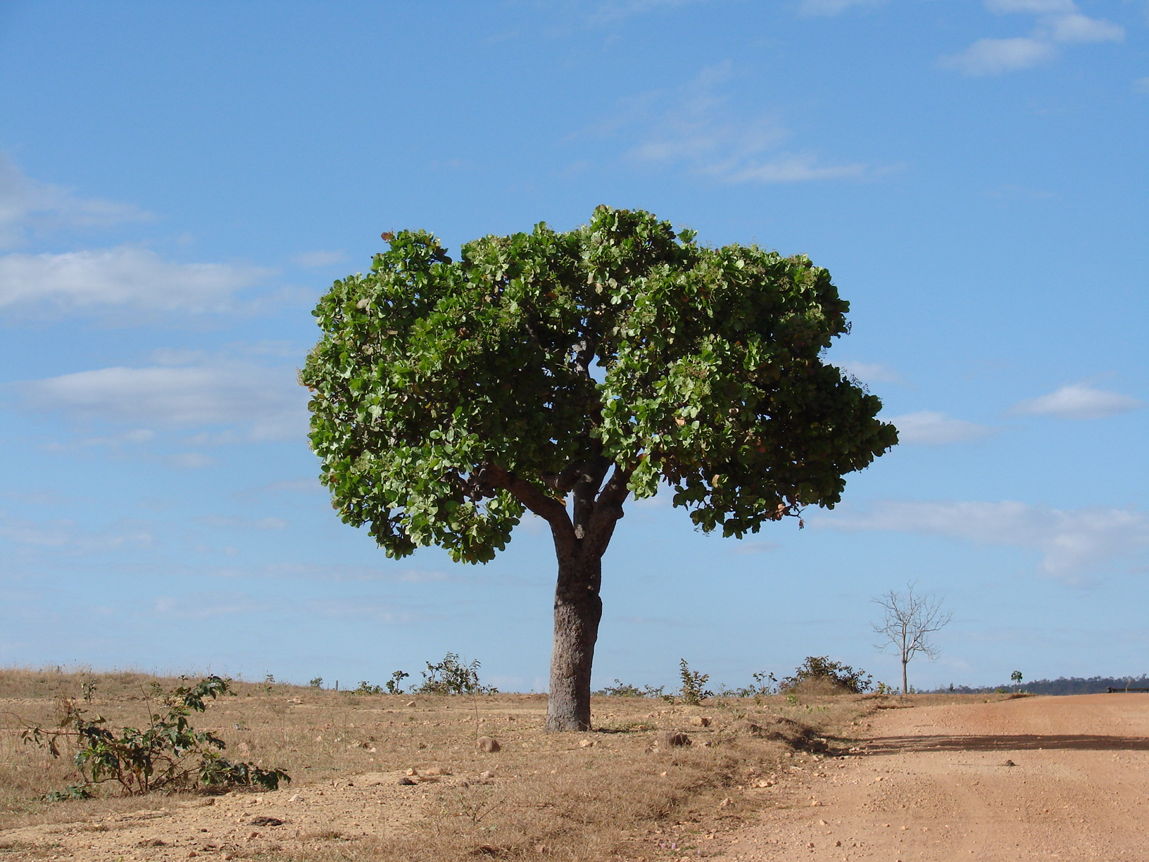 Curatella americana, Uma Lixeira reina solitária no cerrado mato-grossense